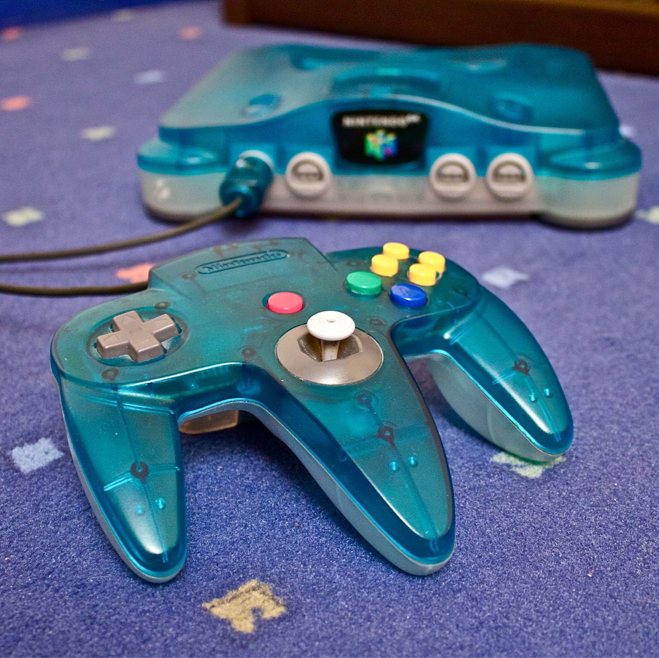 Console Nintendo 64 Clear Blue Prise en photo sur une moquette bleue. Léger floutage de l'objet en arrière plan